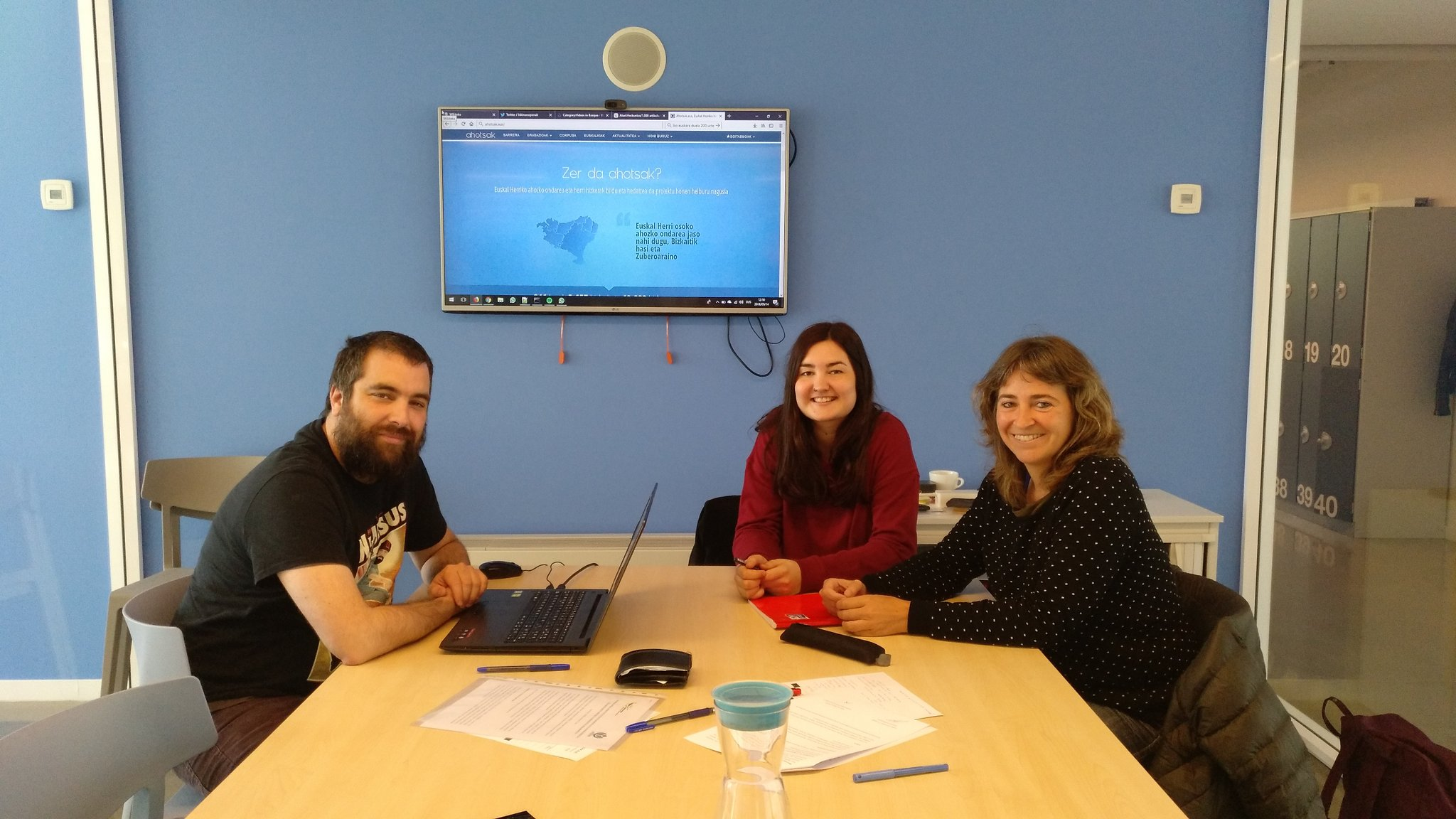 Euskal Wikilarien Kultura Elkartea eta Ahotsaken arteko akordioa